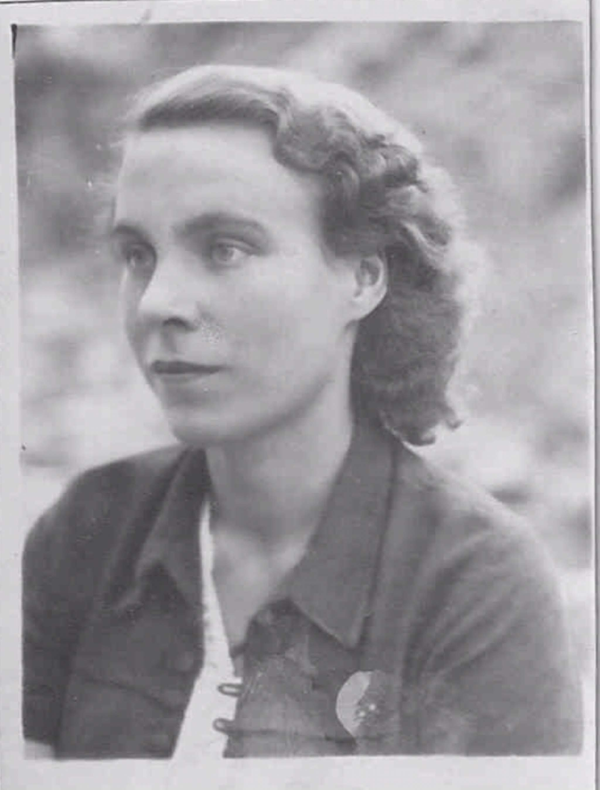 Мария Котляревская